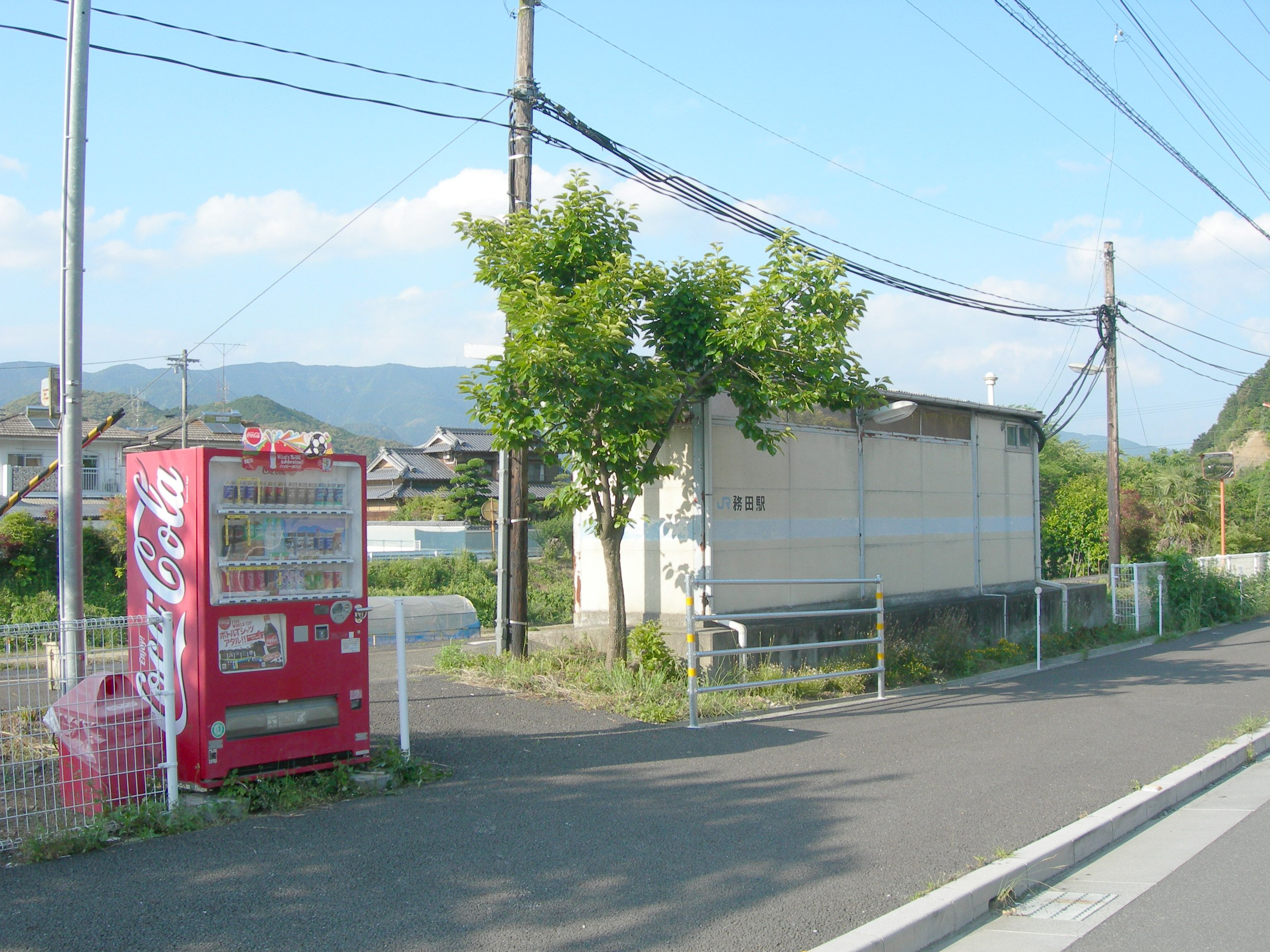 務田駅